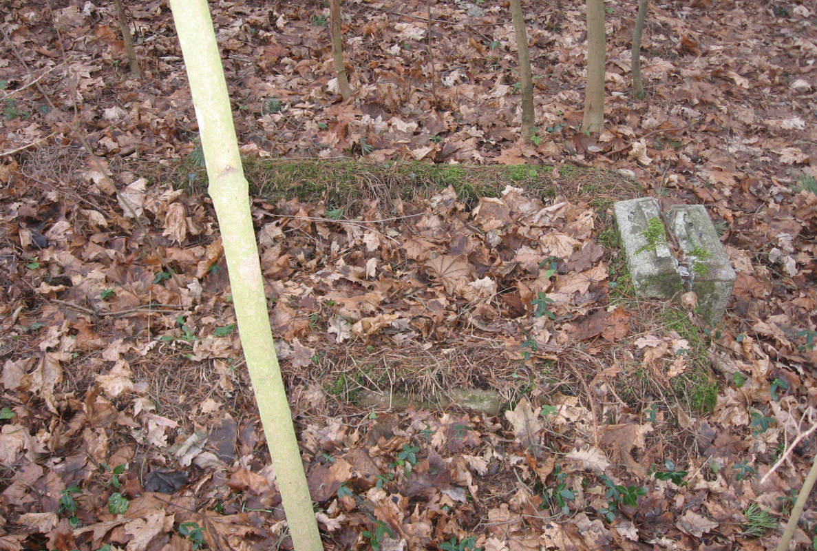 Zdewastowany nagrobek na cmentarzu w Lubowidzu w 2012 roku. Z prawej strony widać postument pozostały po wyłamanym krzyżu żelaznym.